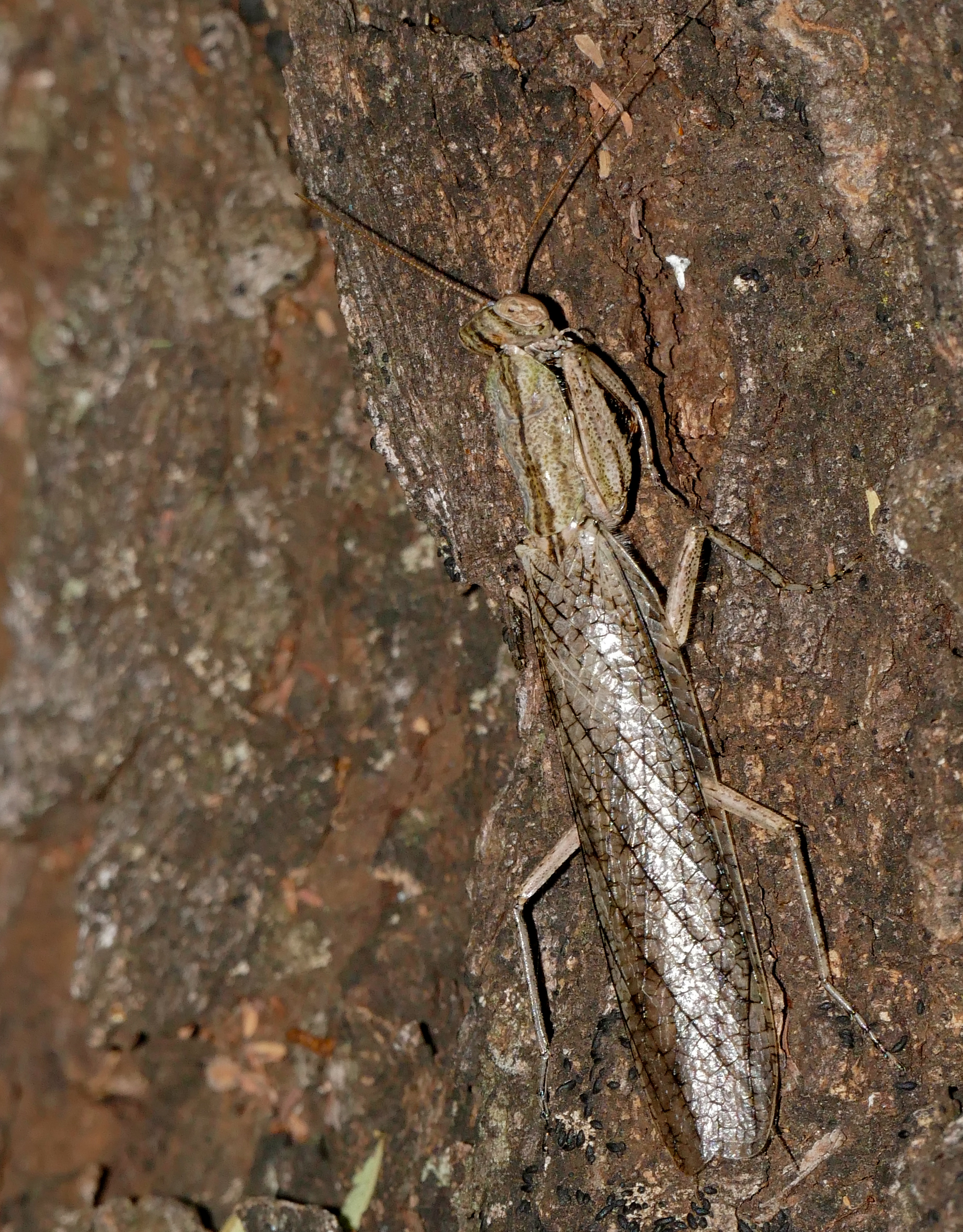 Lower Sabie Camp, Kruger NP, SOUTH AFRICA